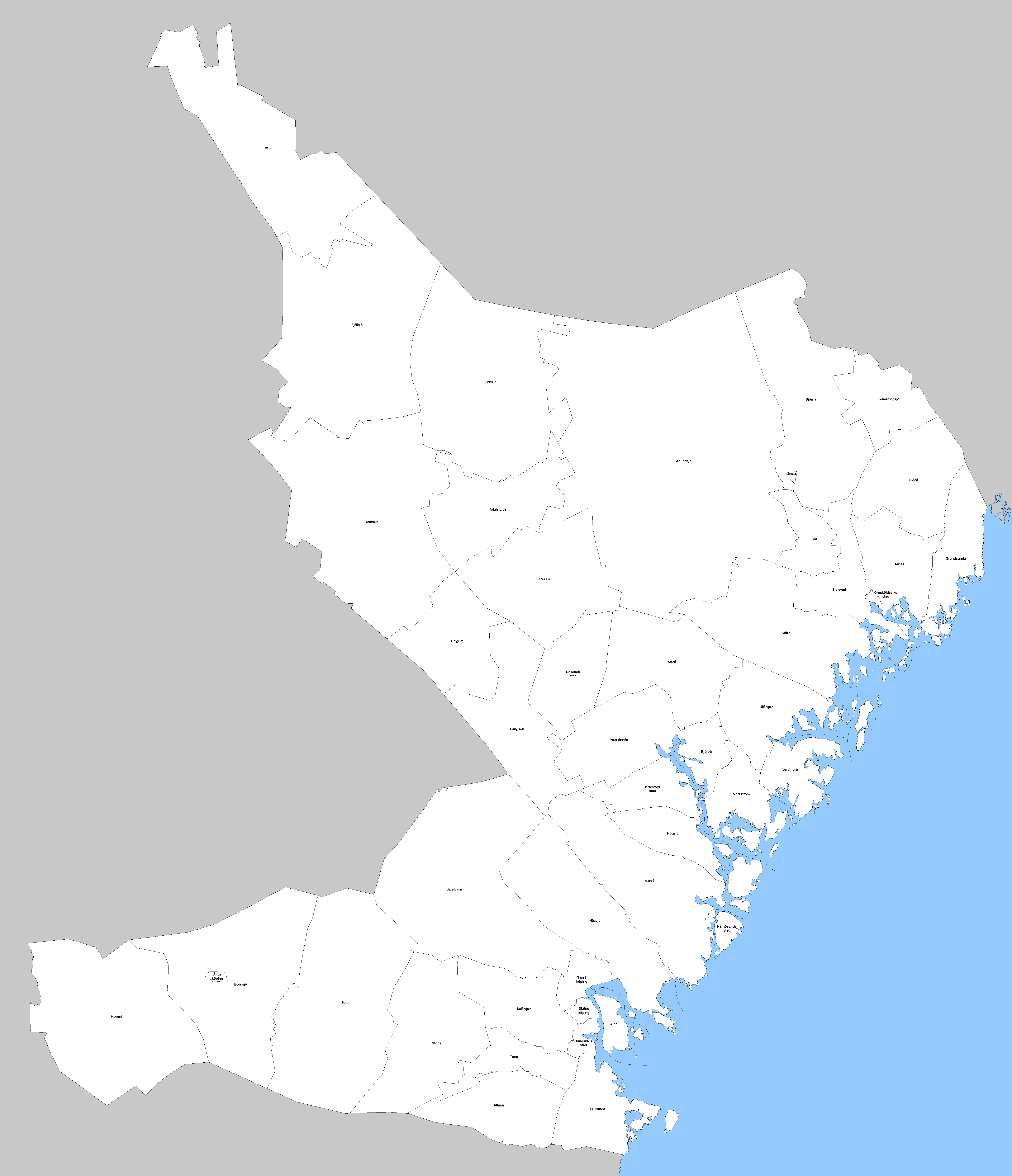 Kommunerna i Västernorrlands län den 1 januari 1952